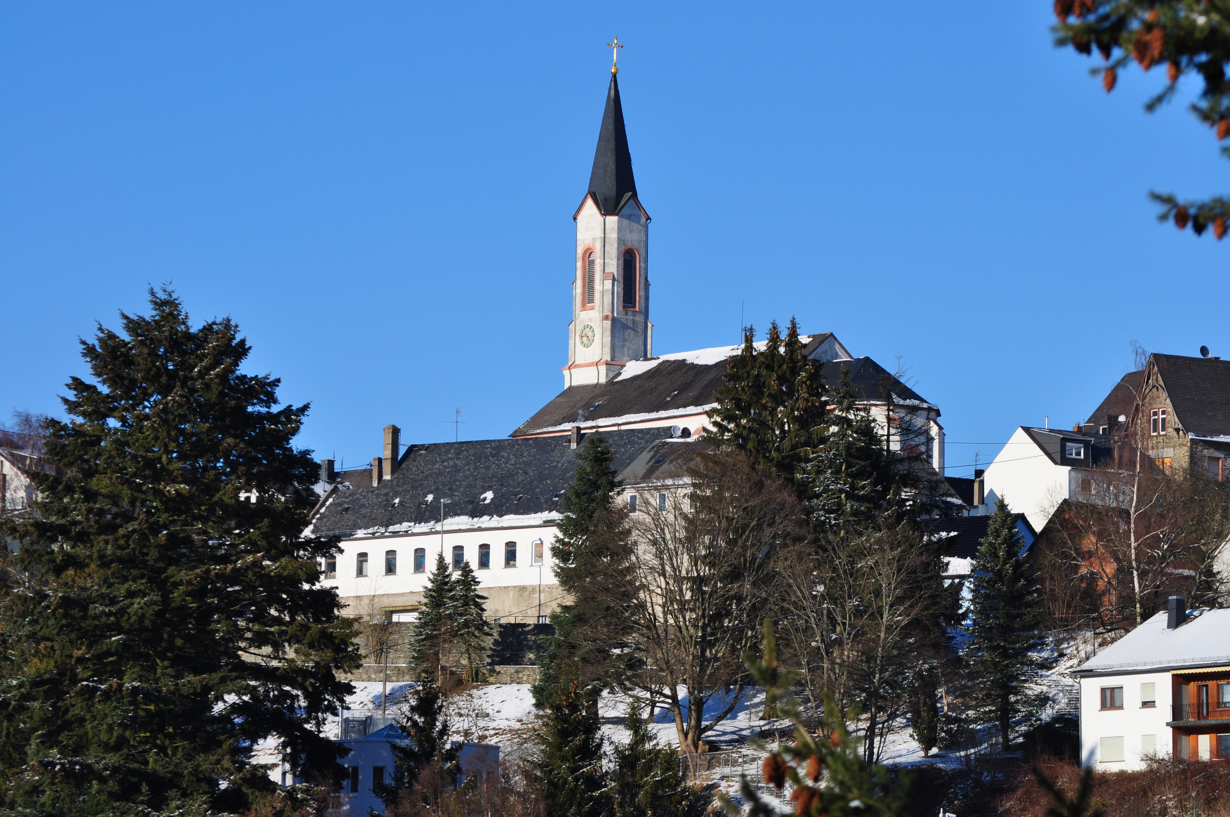 Oberreifenberg, Kirche